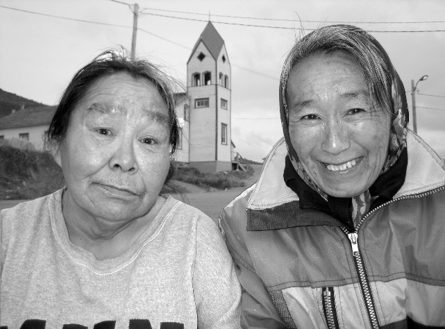 Inuit, Labrador (Canada) Je suis l'auteur de cette photo (André Perron)